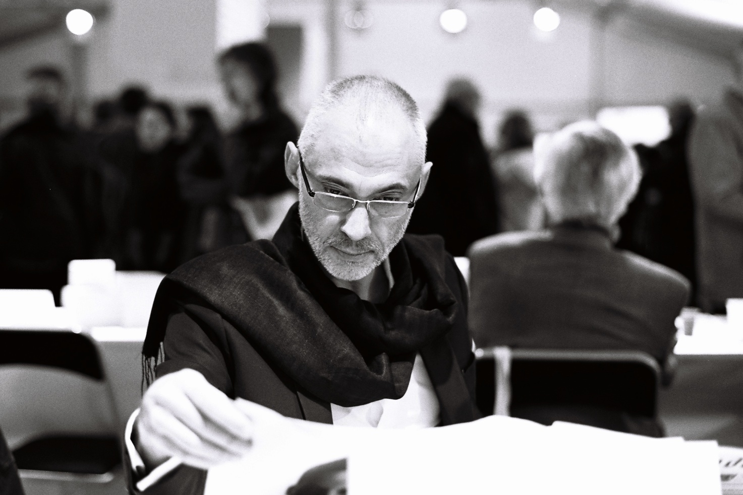 Éric Laurrent au salon du livre Radio France, 26 novembre 2011